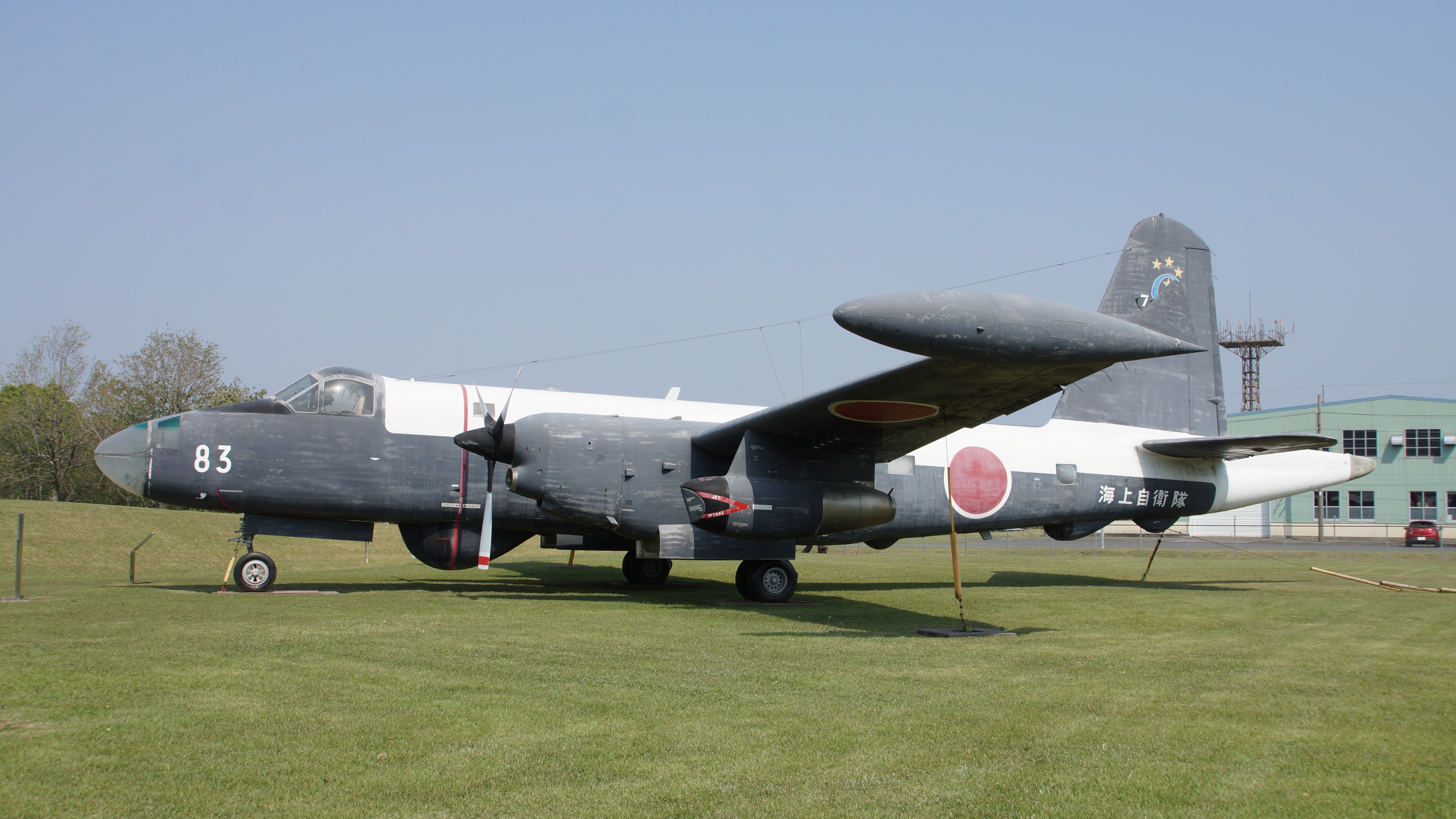 海上自衛隊 P-2J対潜哨戒機（4783号機） 左前面。2017年4月29日 海上自衛隊鹿屋航空基地史料館にて。